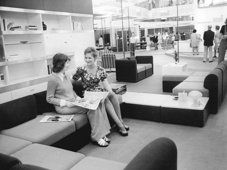 Leipzig, Messe, Möbelausstellung ADN-ZB Deutsche Demokratische Republik 4.9.74 pom. Leipziger Herbstmesse vom 1.-8. September 1974 Neu- und weiterentwickelte Möbelprogramme offerieren die Kombinate Herllerau, Eisenberg, Zeulenroda und andere Betriebe der DDR-Möbelindustrie auf der diesjährigen Leipziger Herbstmesse. Diese Schrankwand und die Polstergarnitur (unser Foto) produziert das Möbelkombinat Hellerau u. a. auch für den Export in die UdSSR, die Volksrepublik Polen, die CSSR, die Ungarische Volksrepublik, nach Schweden, Frankreich und die BRD. Reporter: Häßler Copyright: ADN-Zentralbild